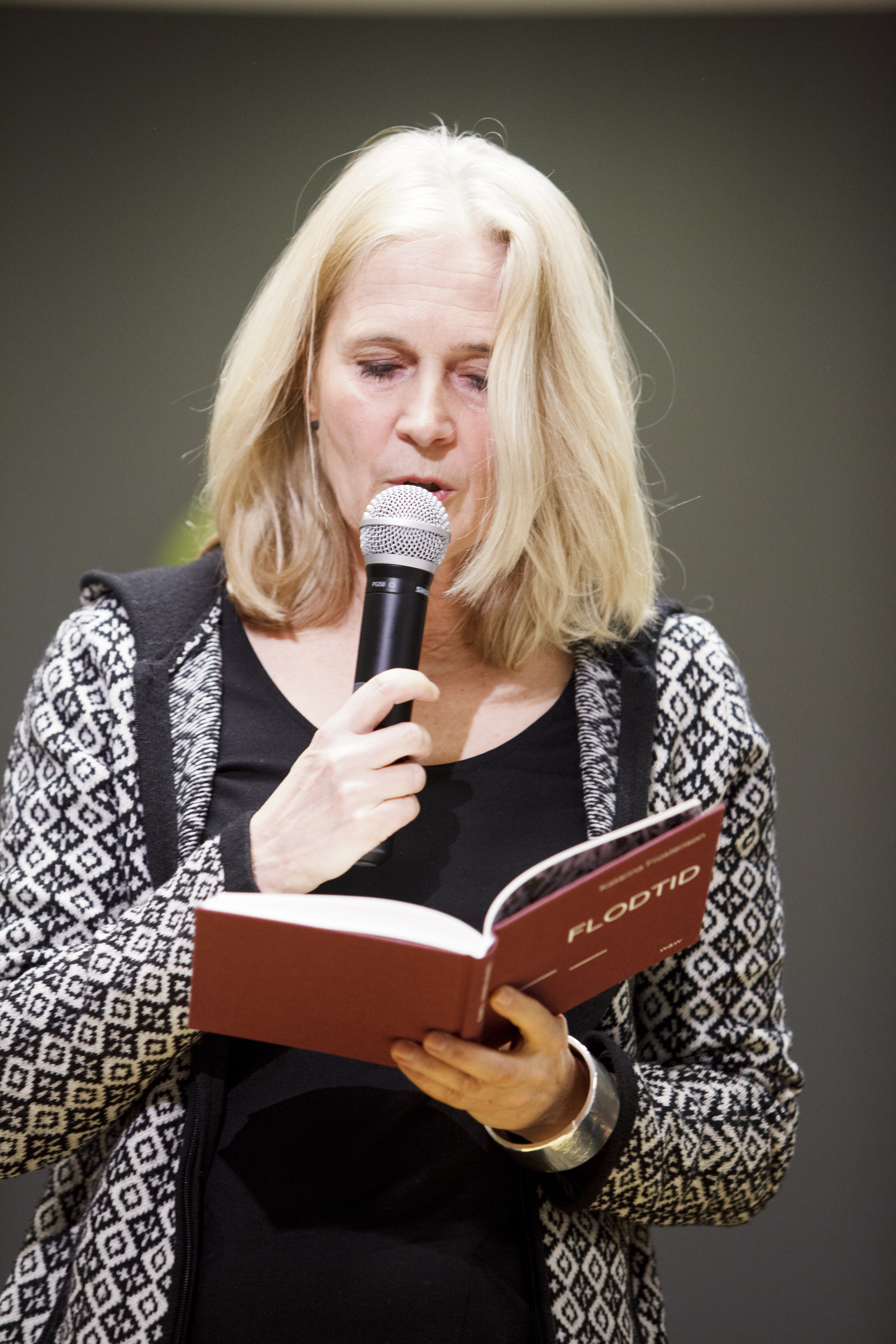 Katarina Frostenson fra Sverige, nomineret til Nordisk Råds litteraturpris 2012 til litteraturarrangement hos Kulturkontakt Nord i Finland.